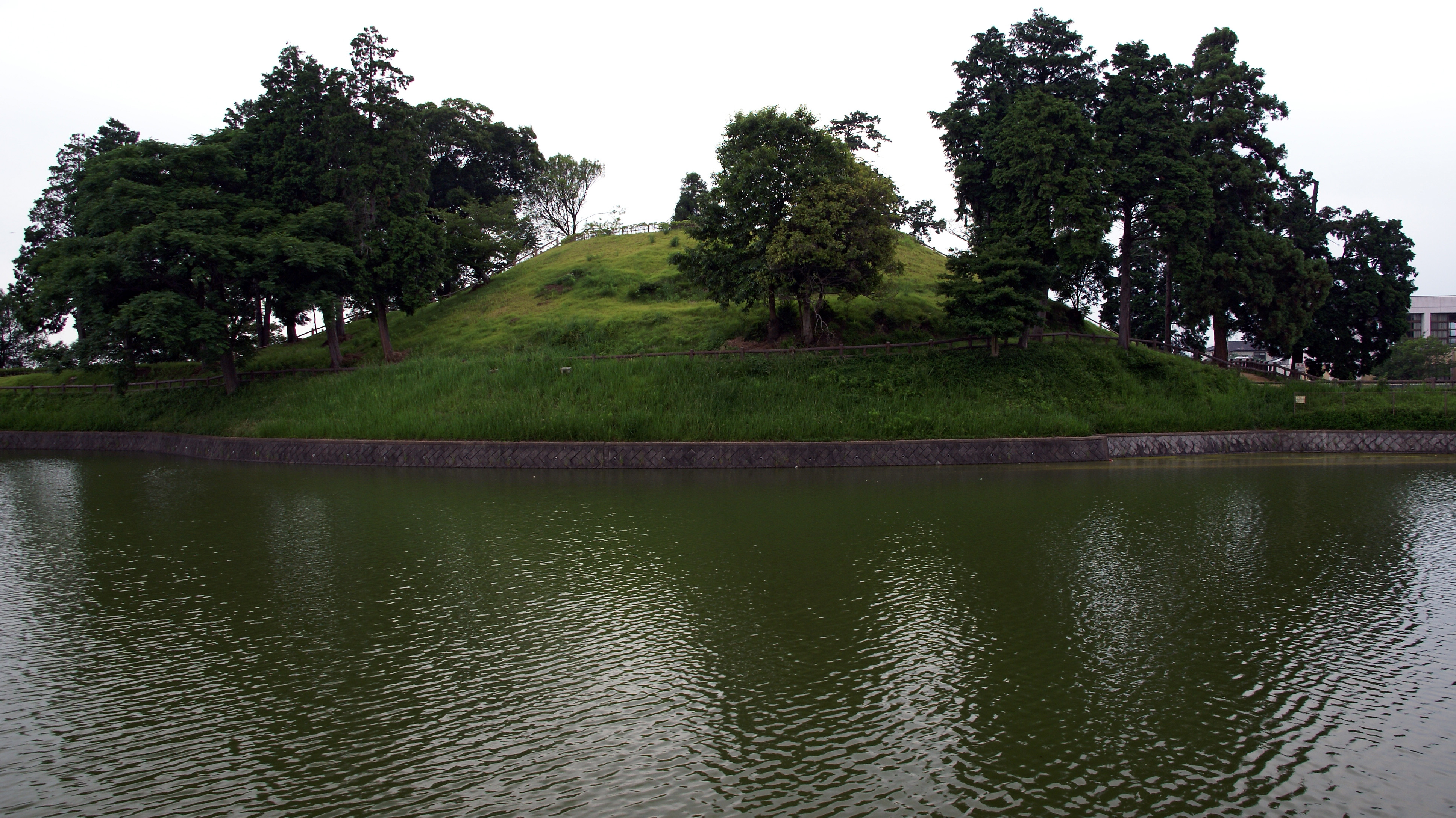 Kuroduka-kofun in Tenri, Nara, Japan